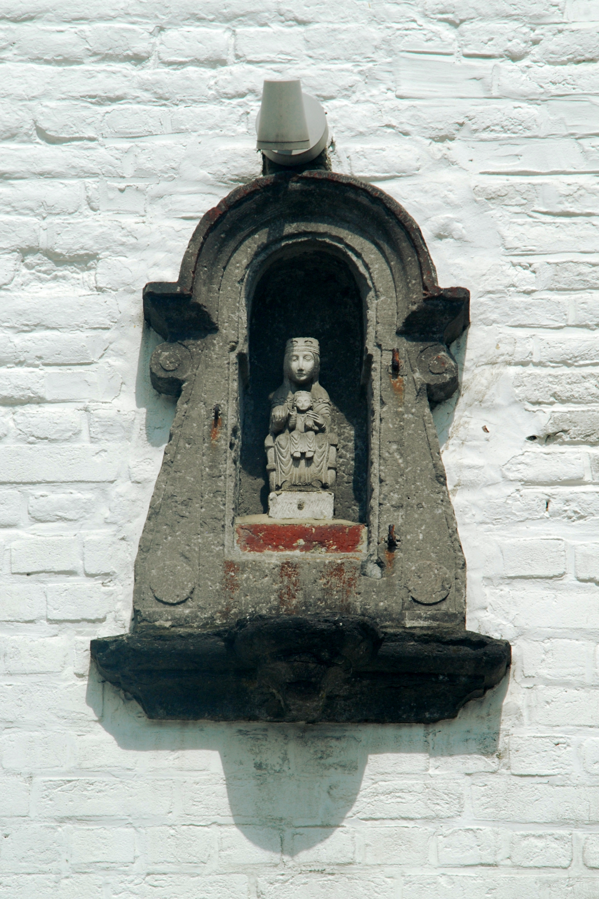 Belgique - Brabant wallon - Église de Court-Saint-Étienne - Cure